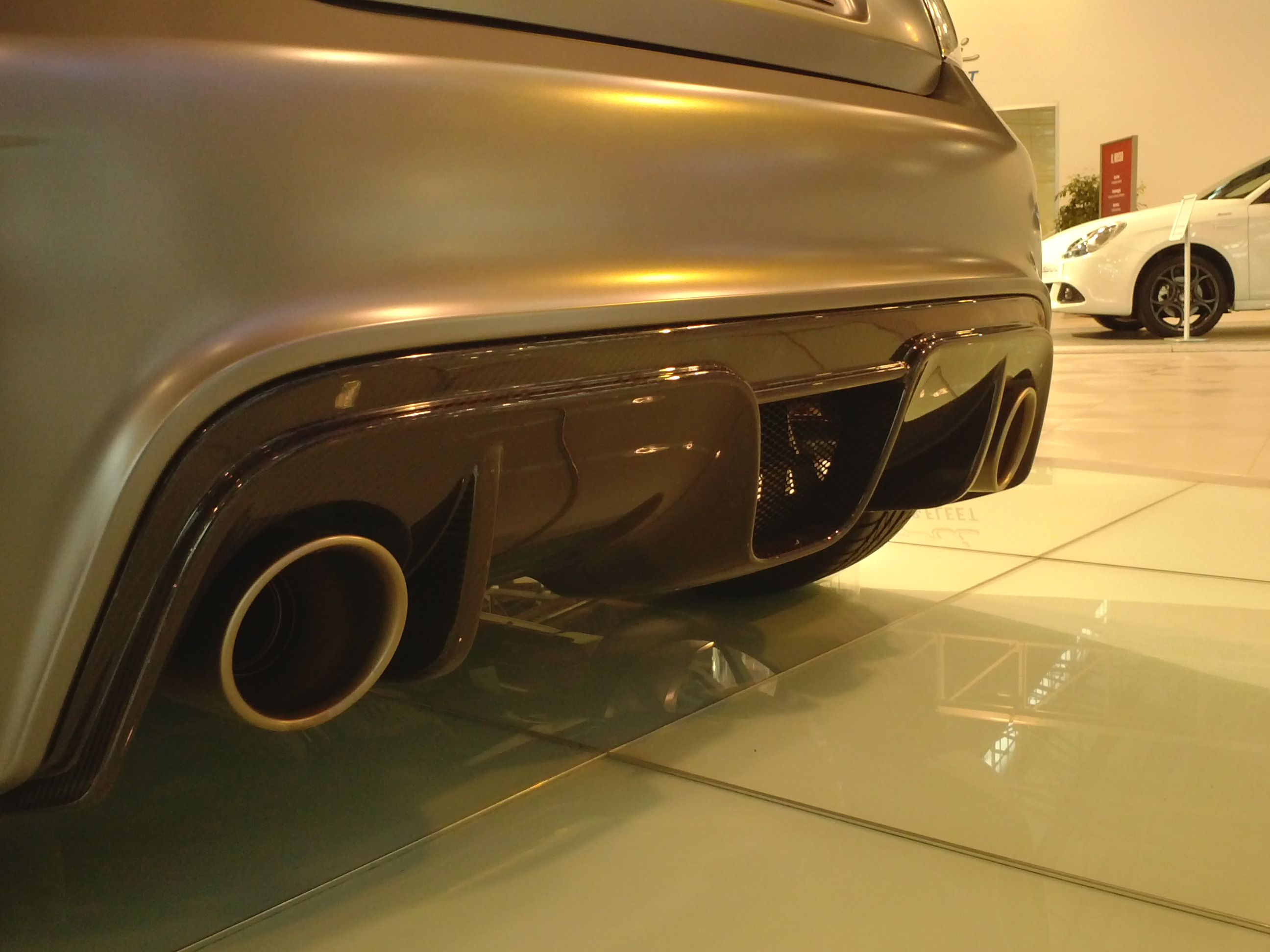 Abarth_695_biposto_Akrapovic